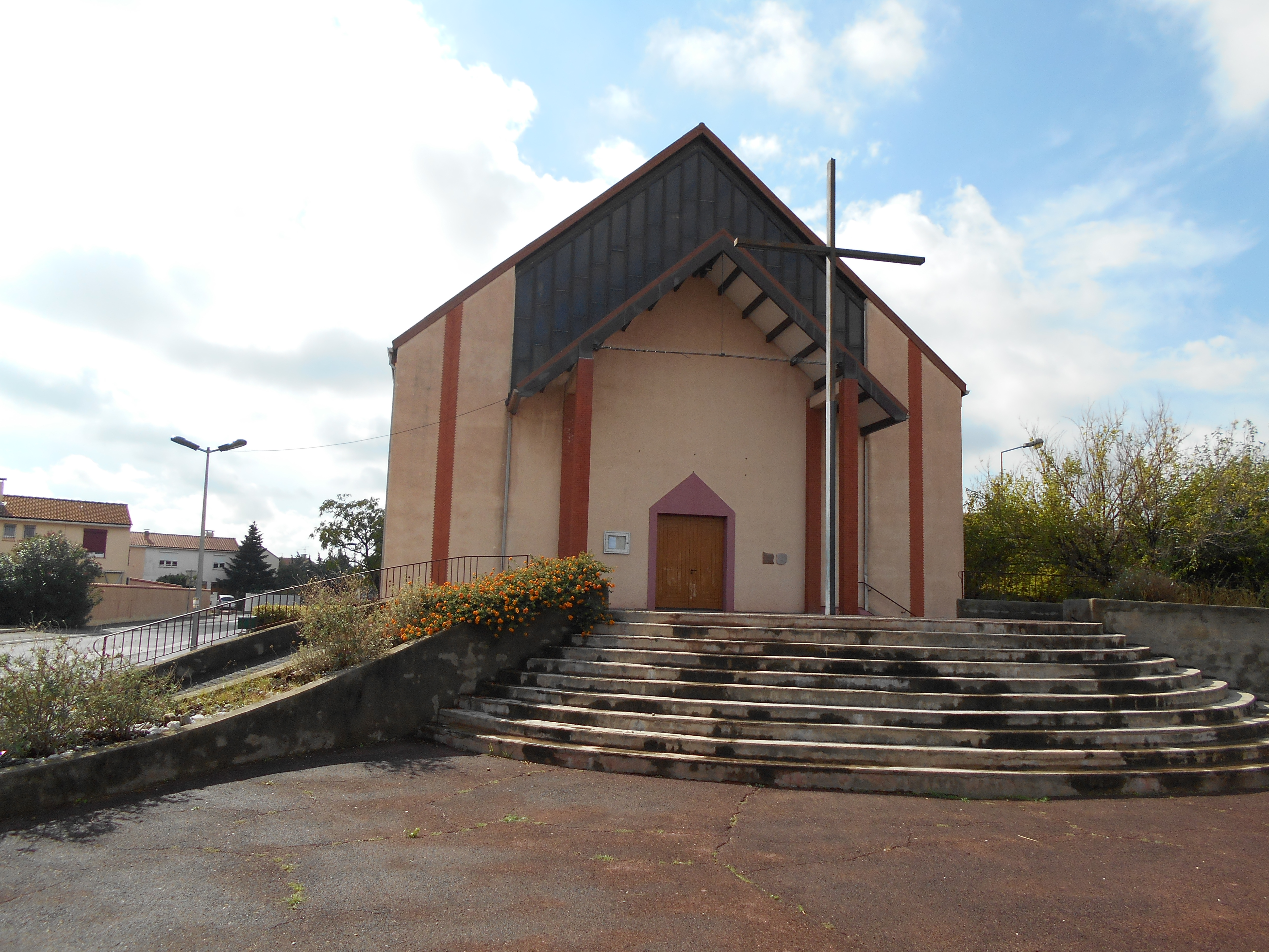 Nostra Senyora del Cenacle de Sant Esteve del Monestir 1